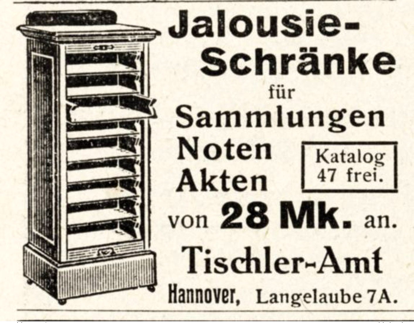 Illustrierte Werbeanzeige des Tischler-Amts Hannover, Langelaube 7A, aus dem Jahr 1914 mit einem Beispiel für „Jalousie-Schränke“ für Sammlungen, Noten, Akten. von 28 Mk. an. Katalog 47 frei.